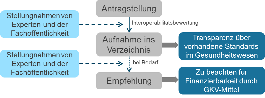 Das Bild dient der Veranschaulichung und Zusammenfassung der Prozesse in vesta Standards. Es soll dabei helfen, sich einen schnellen Überblick darüber zu verschaffen, wie der Prozessablauf aussieht